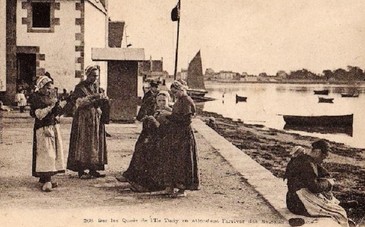 Dentellières à l'Île-Tudy (carte postale antérieure à 1920, auteur inconnu)